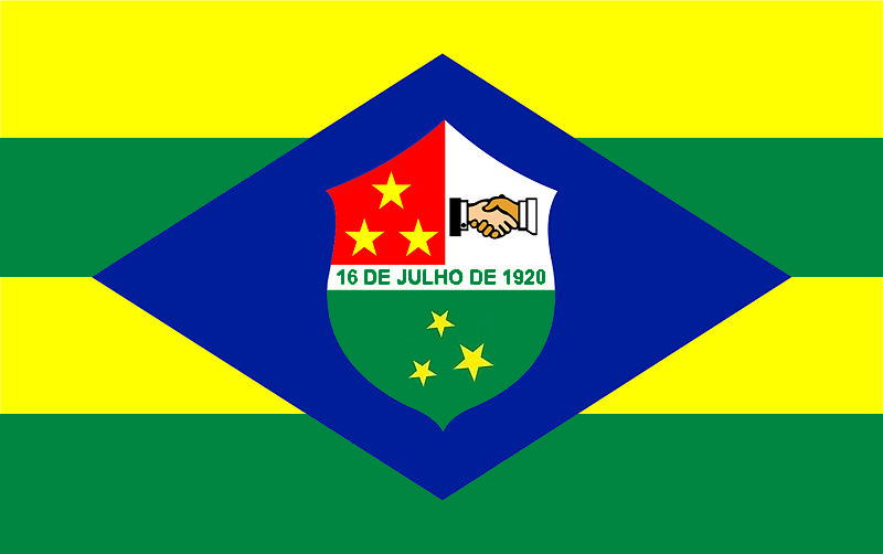 Bandeira do município goiano de Trindade, Brasil.